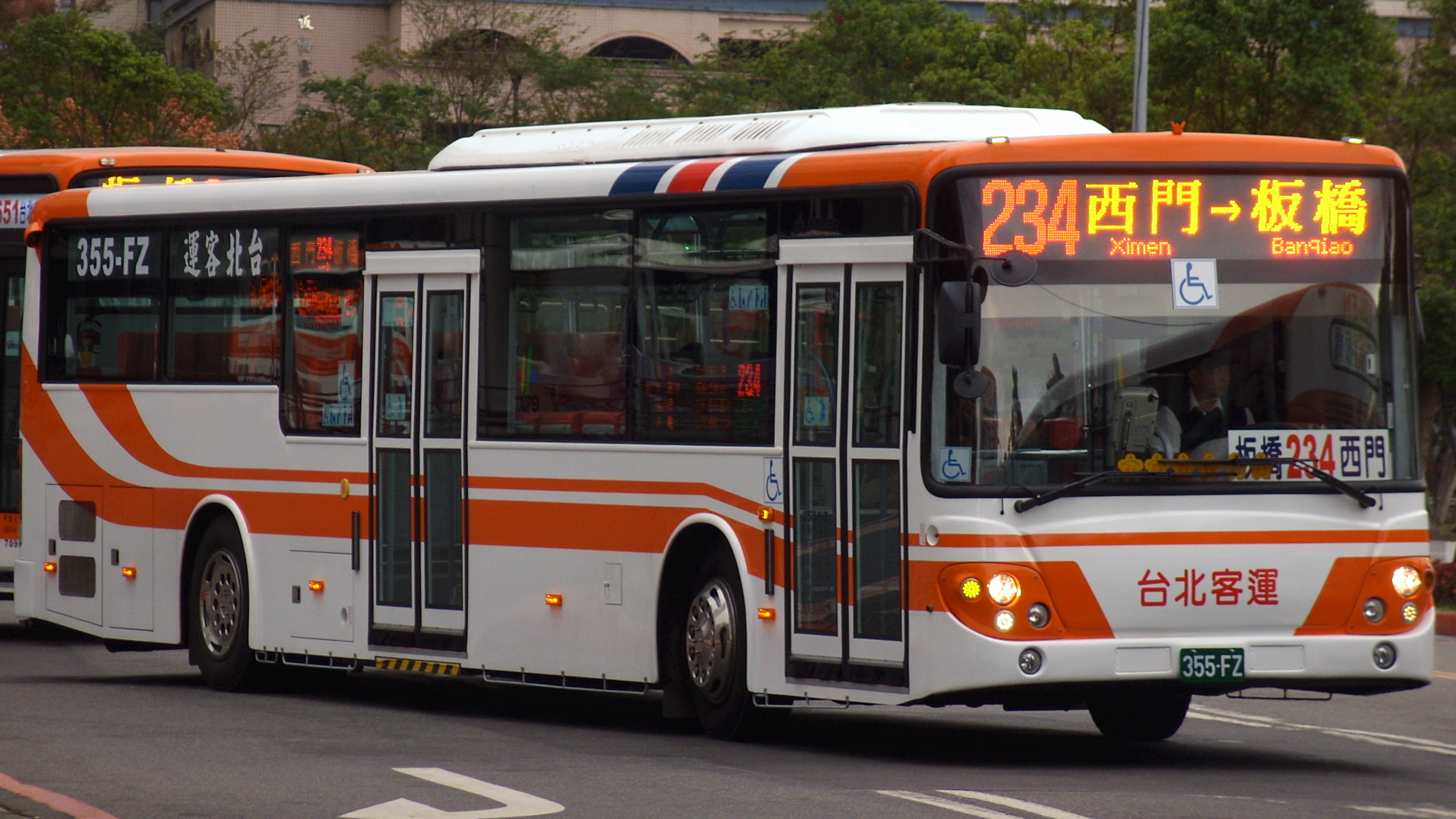 Taipei Bus Route 234 - Daewoo BS120CN.